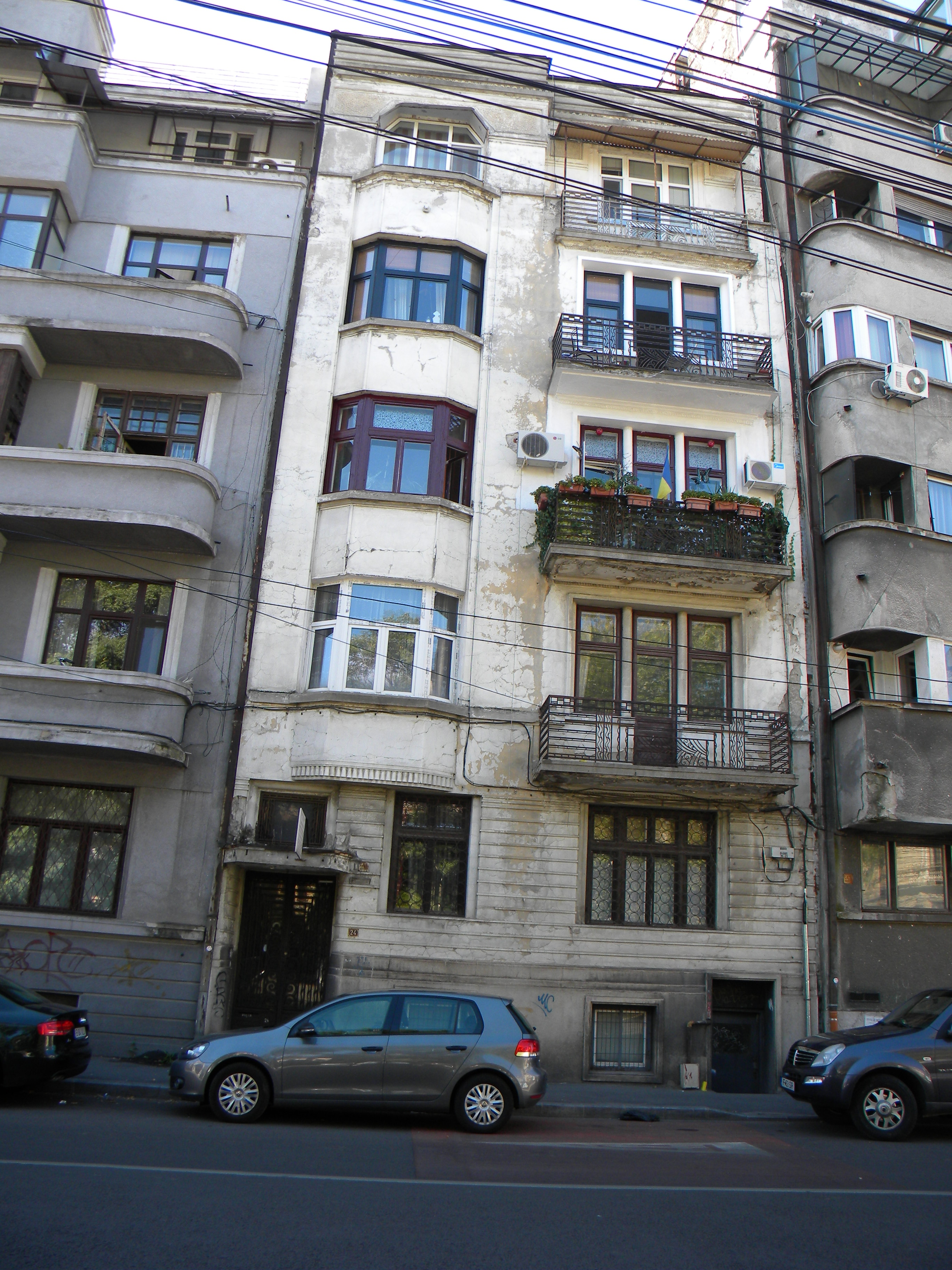 Bucuresti, Romania, Strada Hristo Botev nr. 24 (imobil) sect. 3